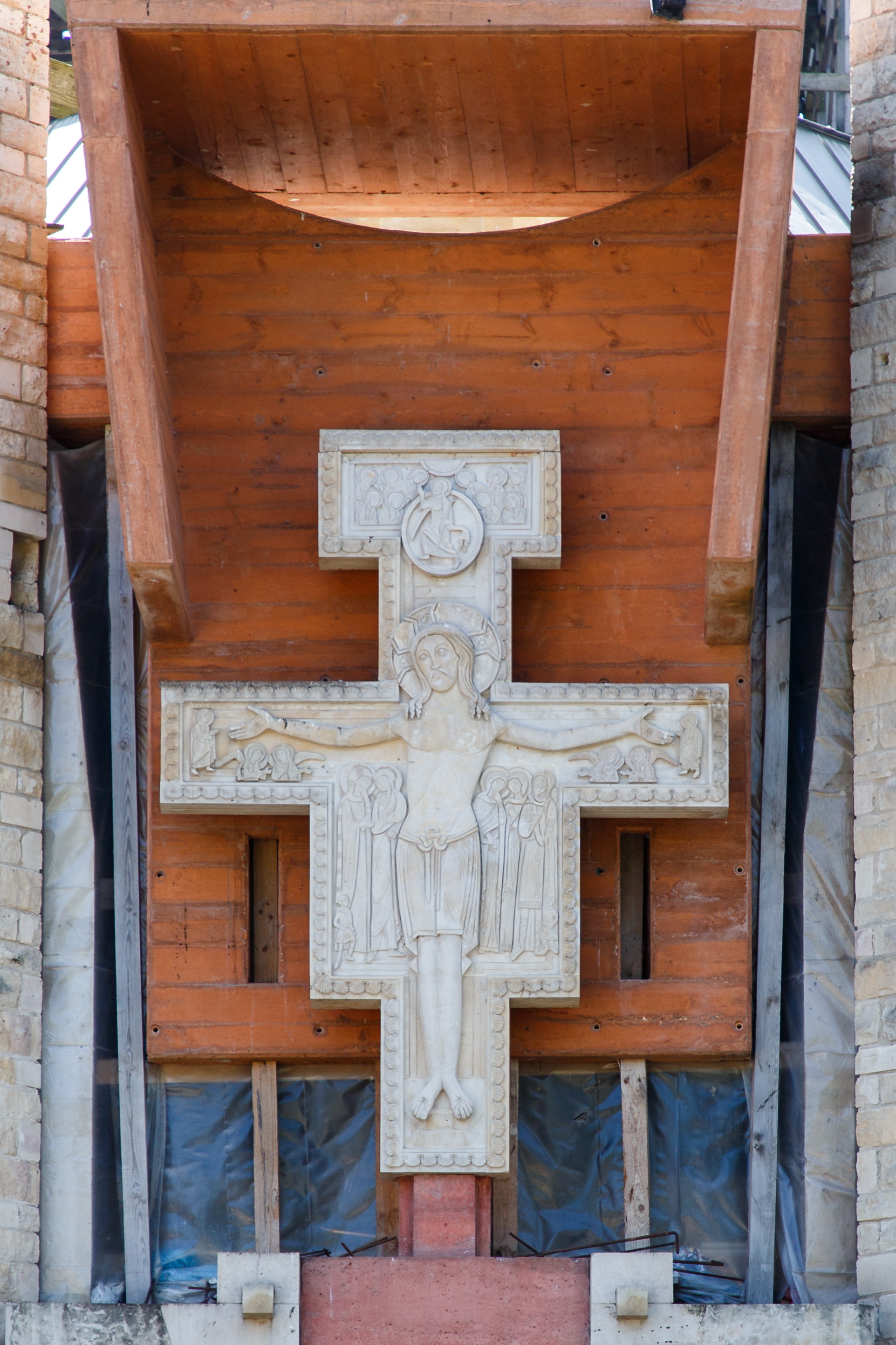 Rzeźba, nawiązująca do krzyża z San Damiano, zamieszczona nad wejściem do kościoła p.w. św. Franciszka z Asyżu i św. Klary w Tychach (stan budowy na 18.05.2019)